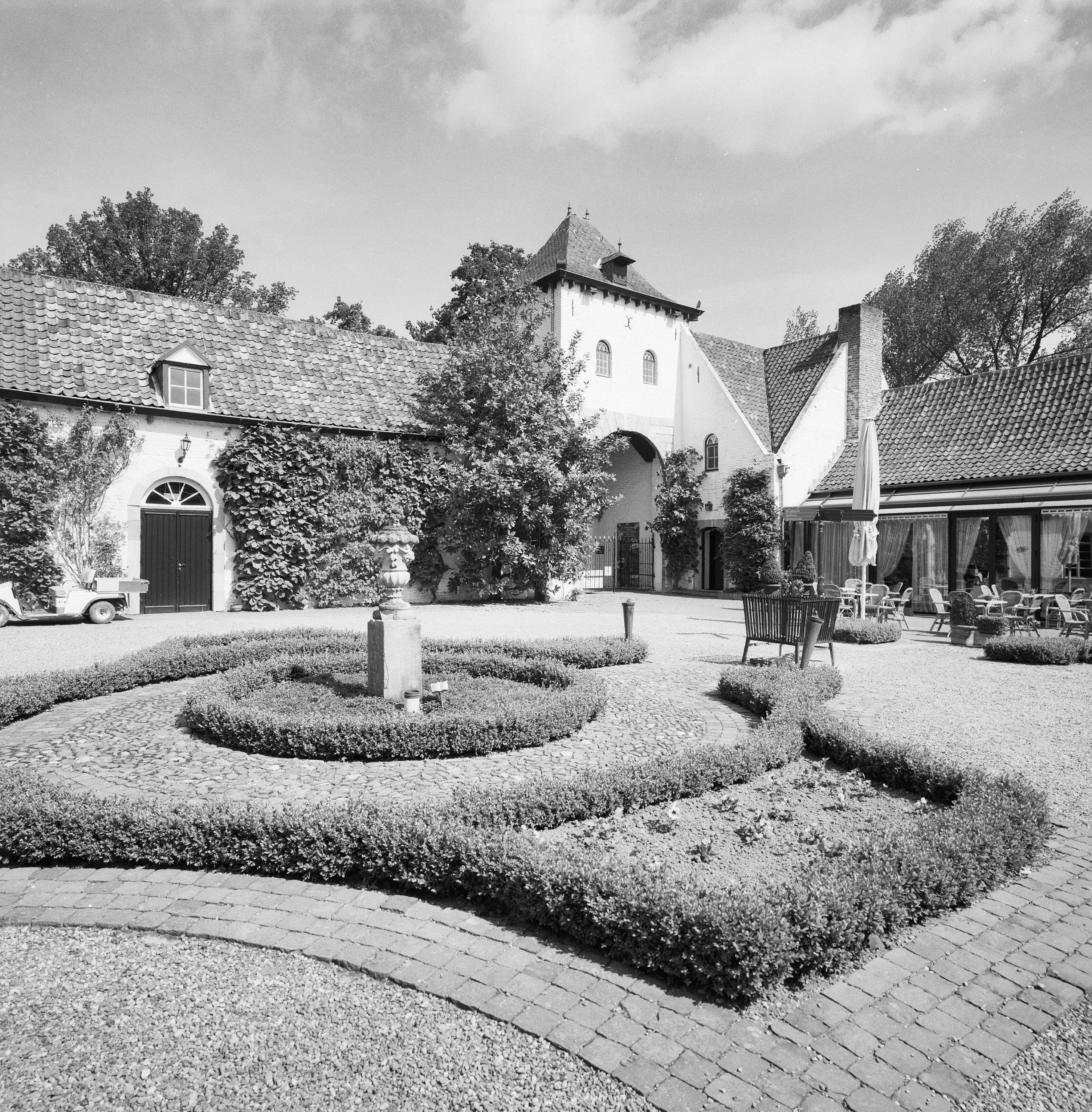 Kasteel Daelenbroeck: Overzicht achtergevel poortpaviljoen, vanaf binnenplaats (opmerking: Gefotografeerd voor Monumenten In Nederland Limburg)